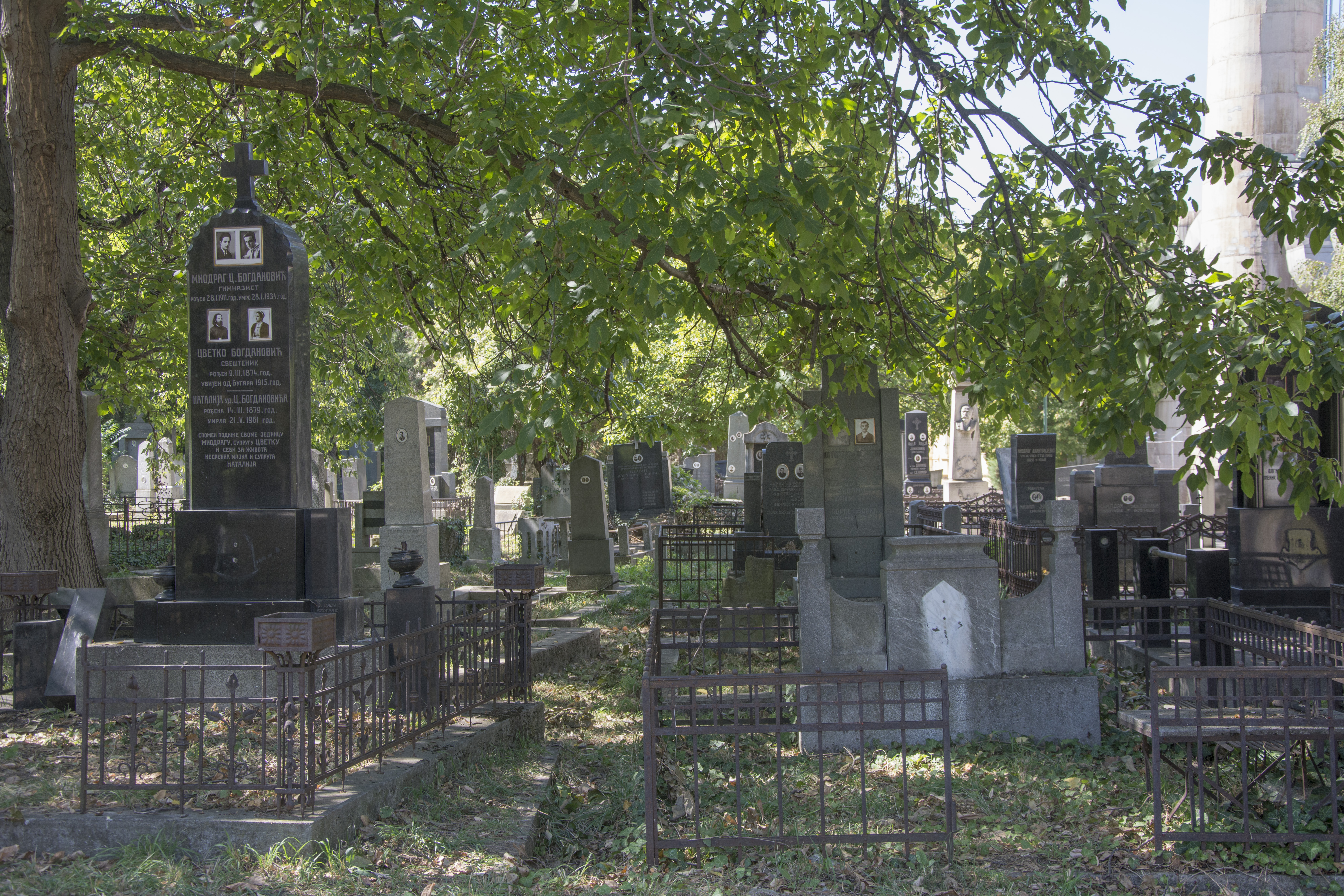 Старо Нишко гробље